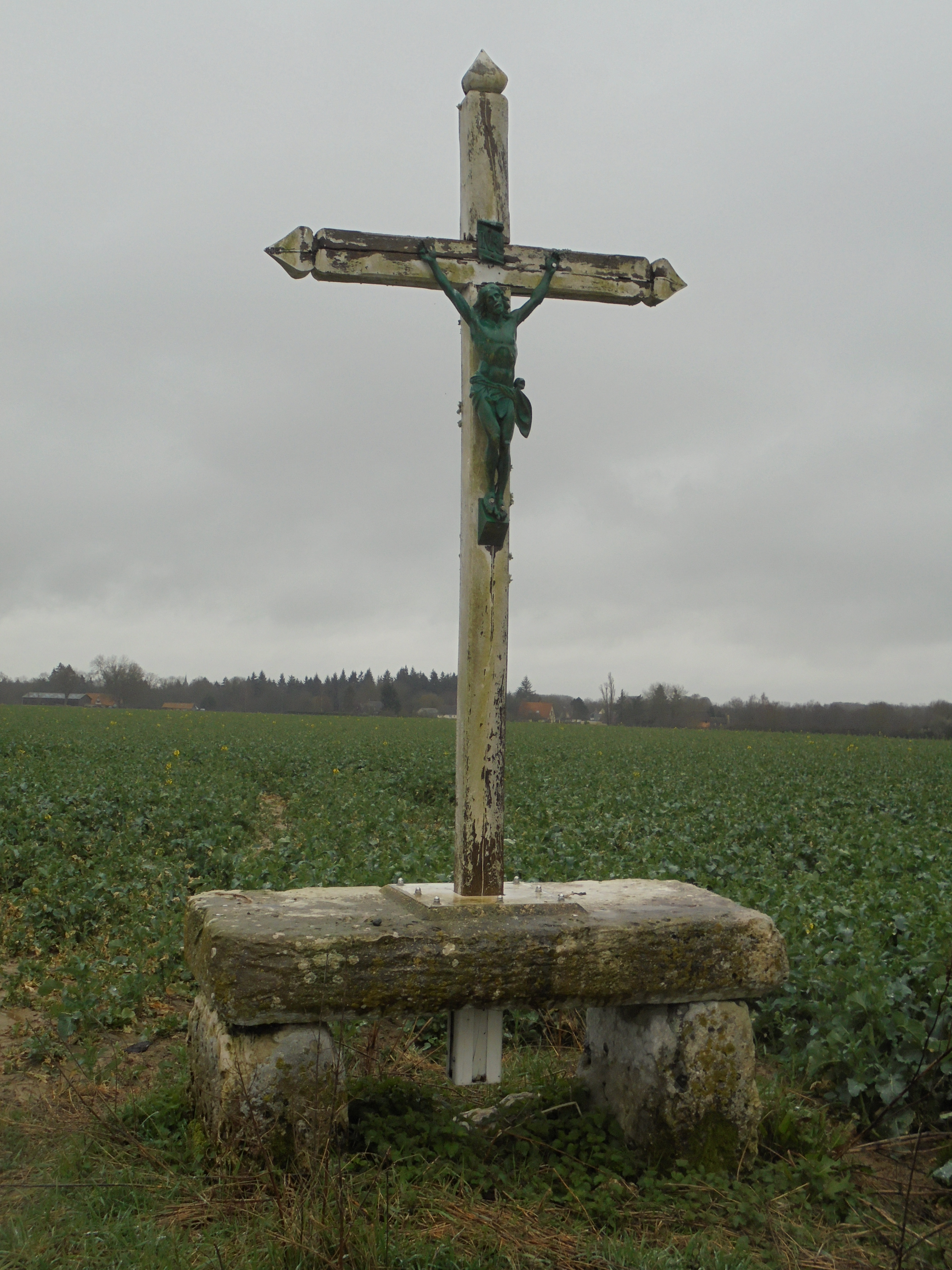 Dolmen de Surville dans l'Eure